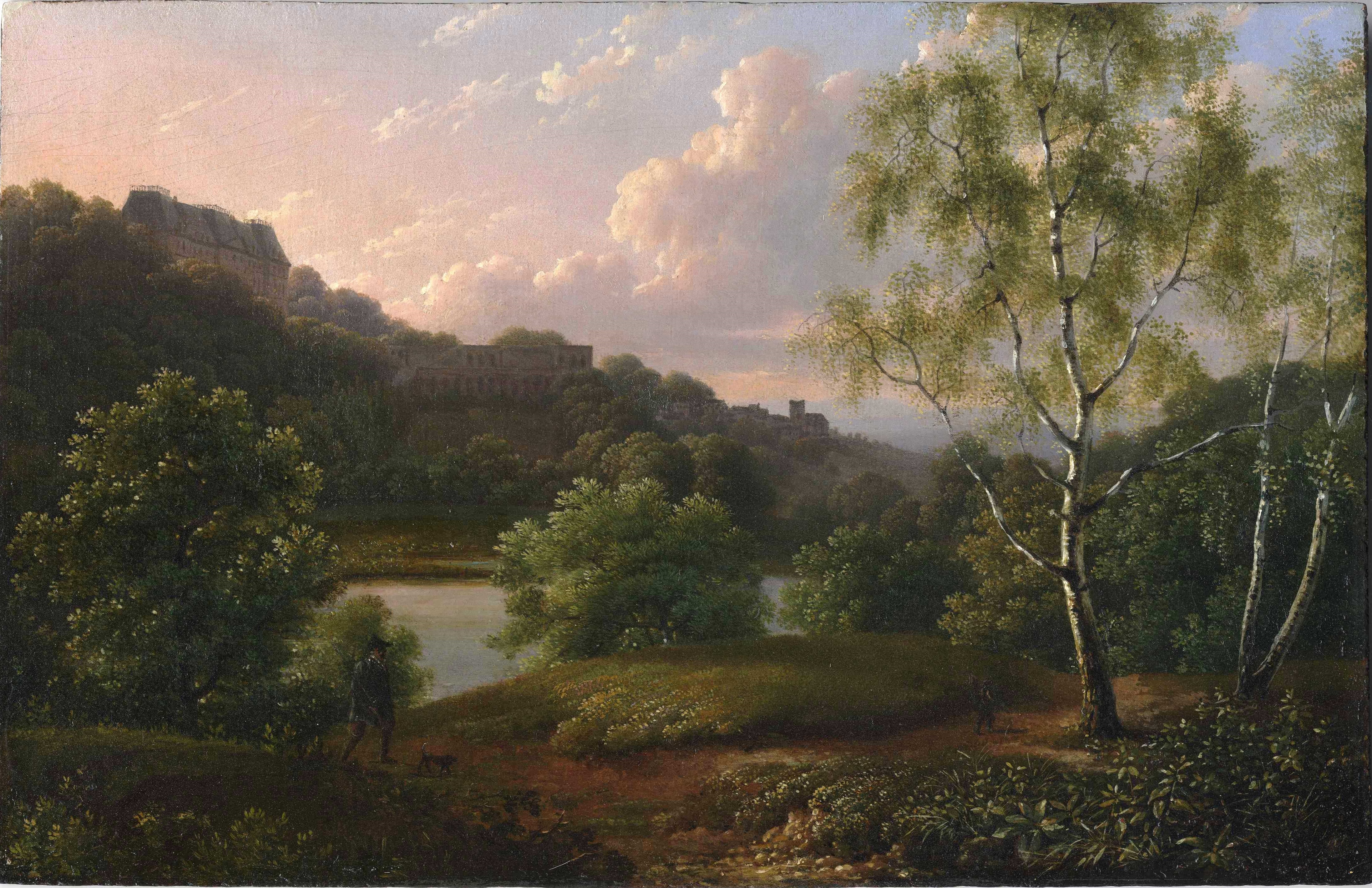 Jean-Joseph-Xavier Bidauld, Chasseur au pied du château de Meudon, 1846. Musée d'art et d'histoire de Meudon, acquisition du 26 septembre 2017 (Artcurial).